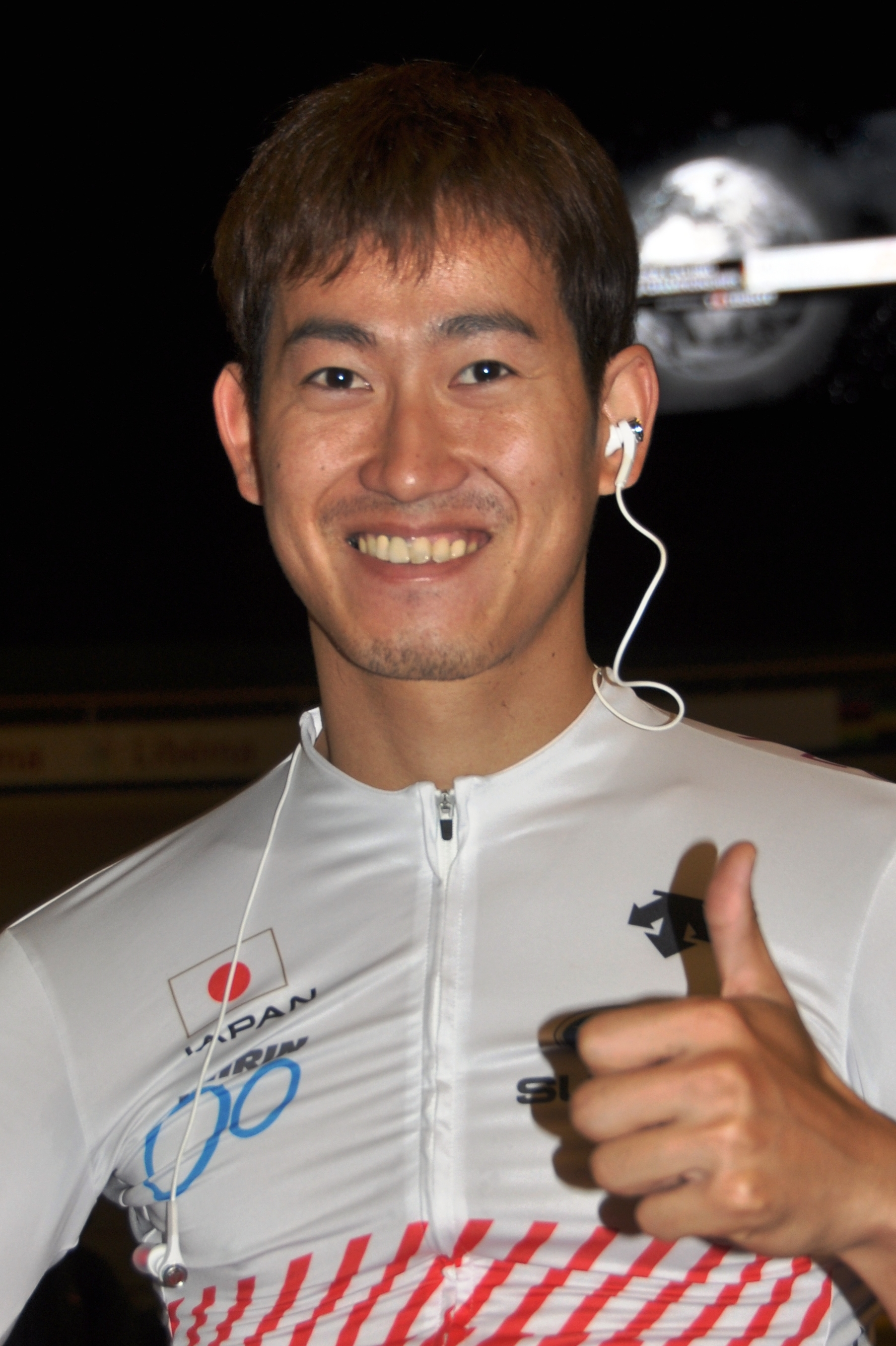 Yuta Wakimoto, japanischer Radsportler